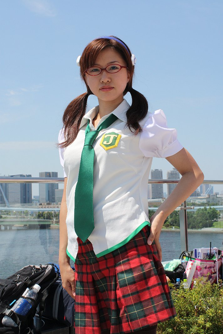 Comic Market 76，《新世紀福音戰士》真希波·真理·伊拉絲多莉亞斯cosplayer。